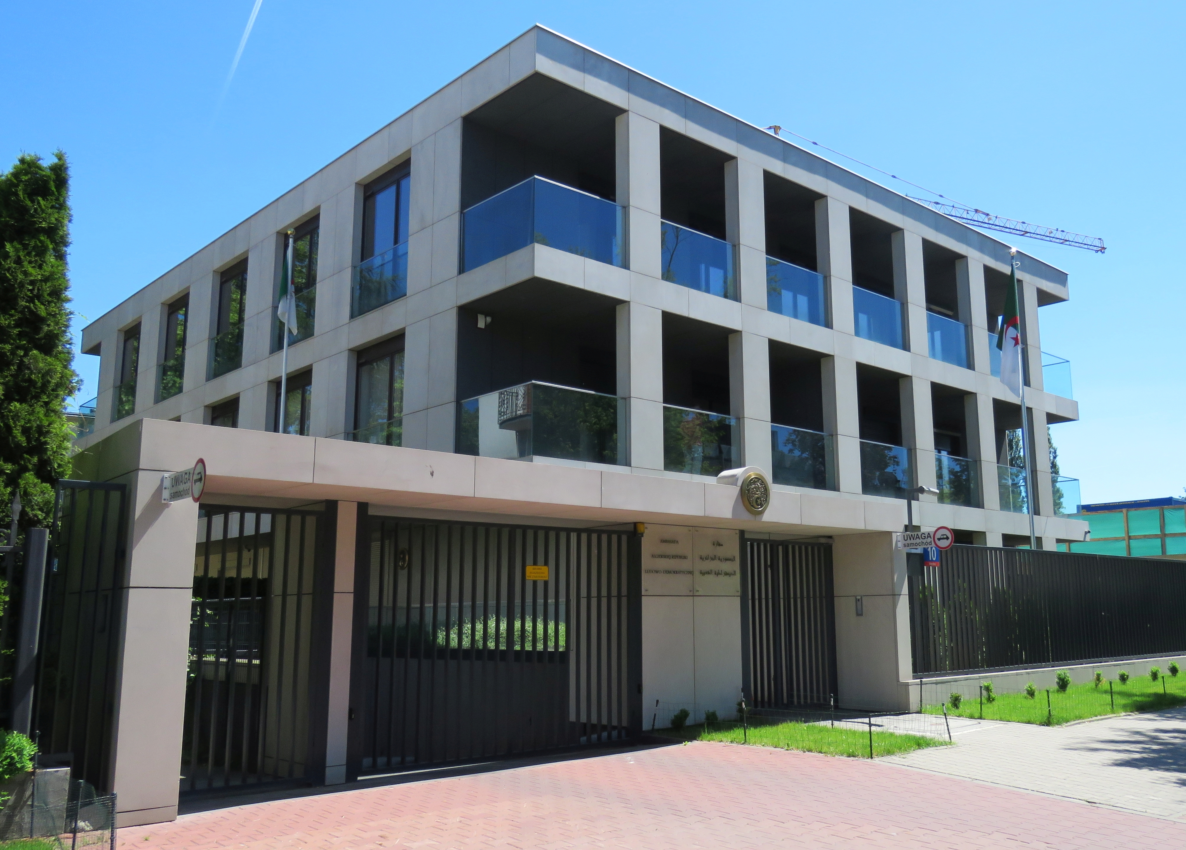 Ambasada Algierii w Polsce